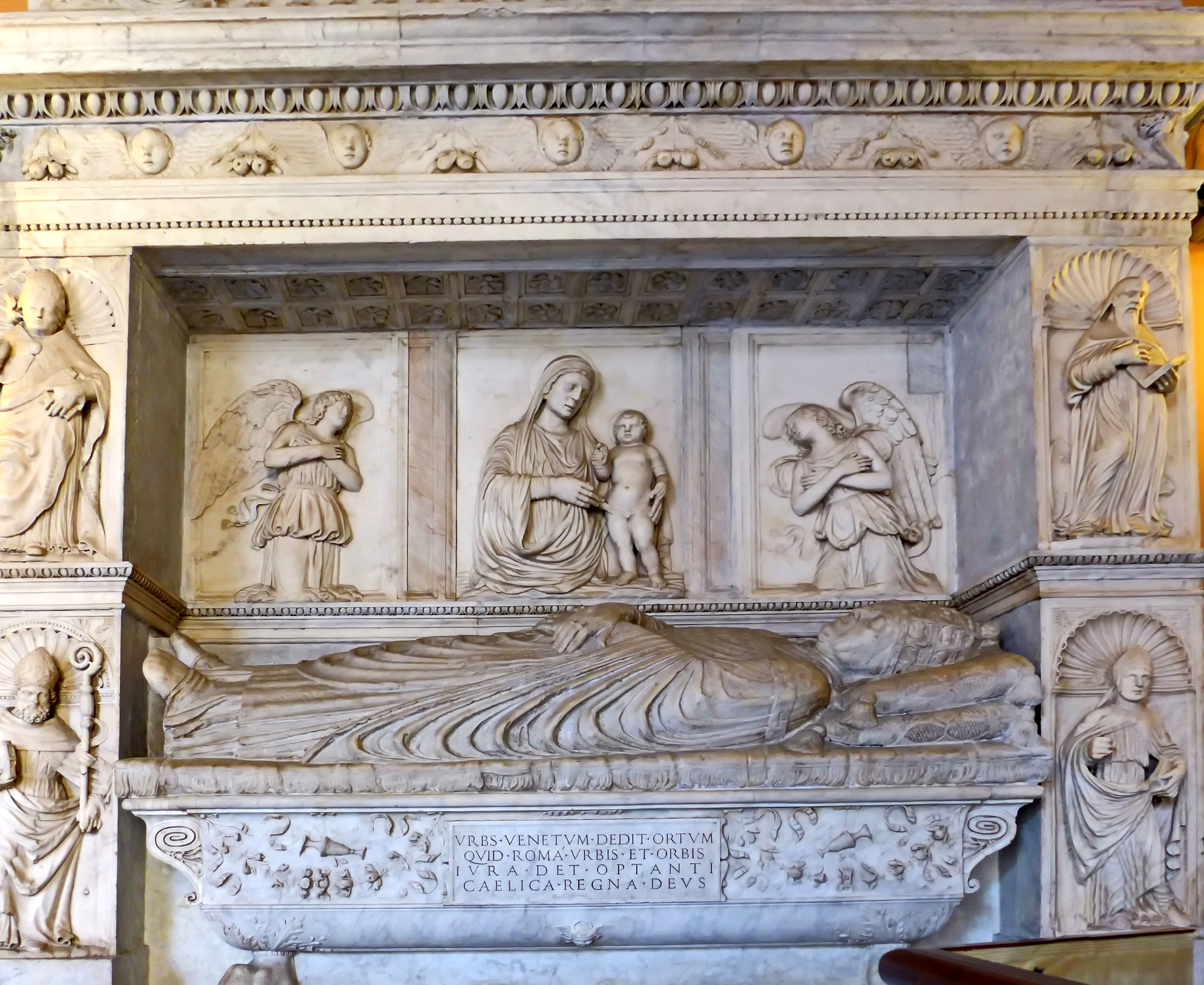 San Salvatore in Lauro (Rom), Oratorium San Giorgio, Grabmal für Papst Eugen IV.